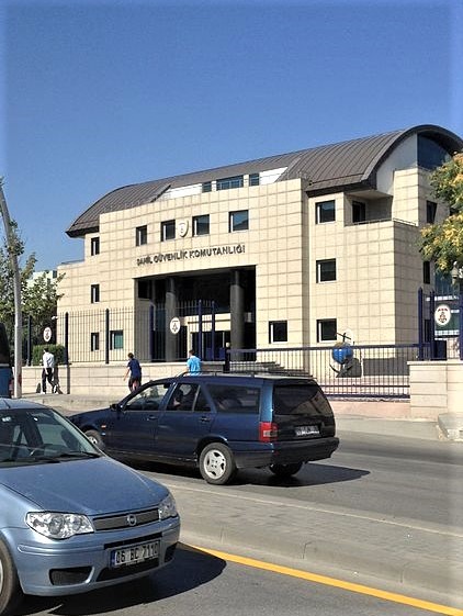 Ankara'da Sahil Güvenlik Komutanlığı binası.